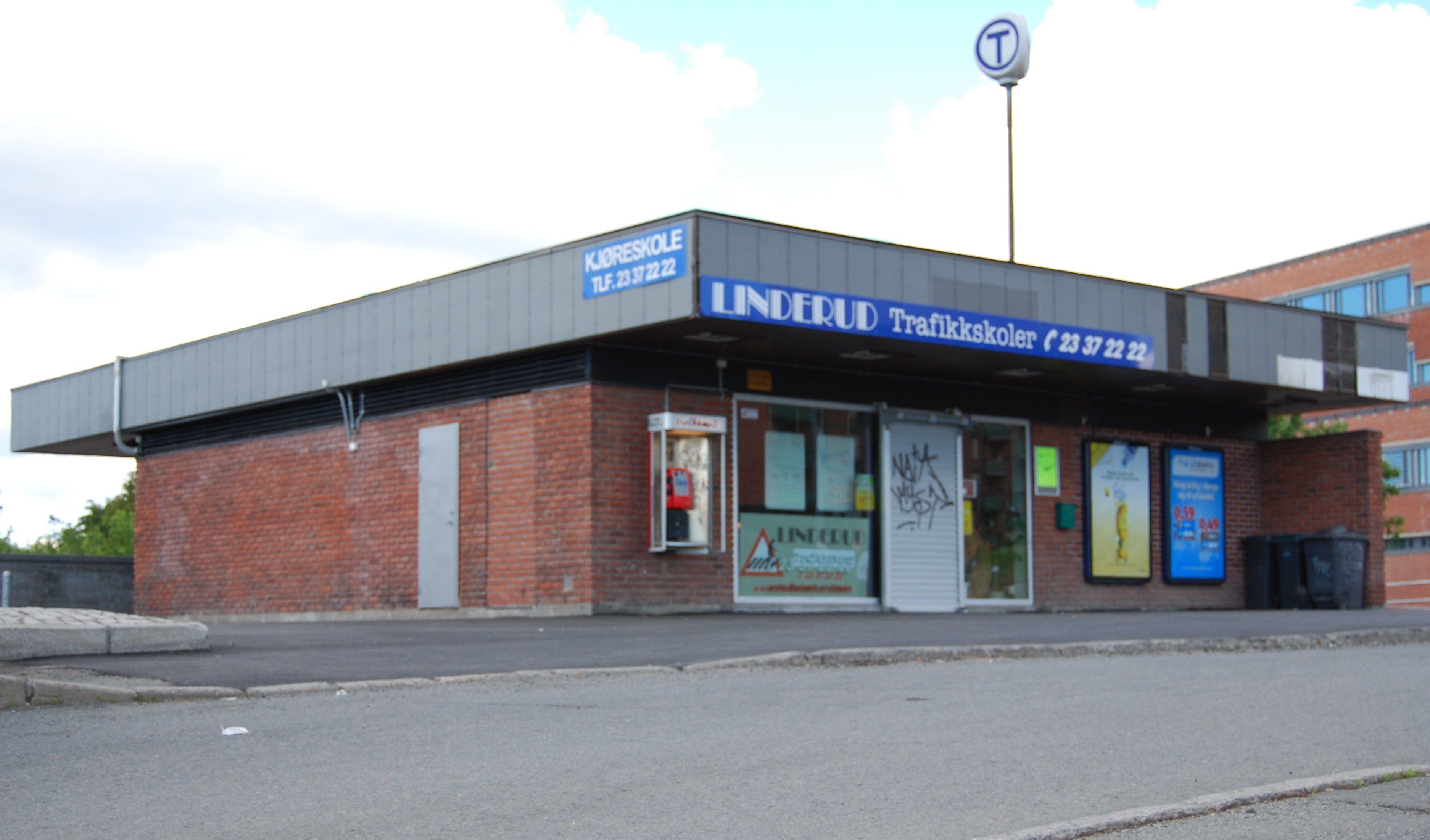 Linderud stasjon (Oslo) 2009 r.